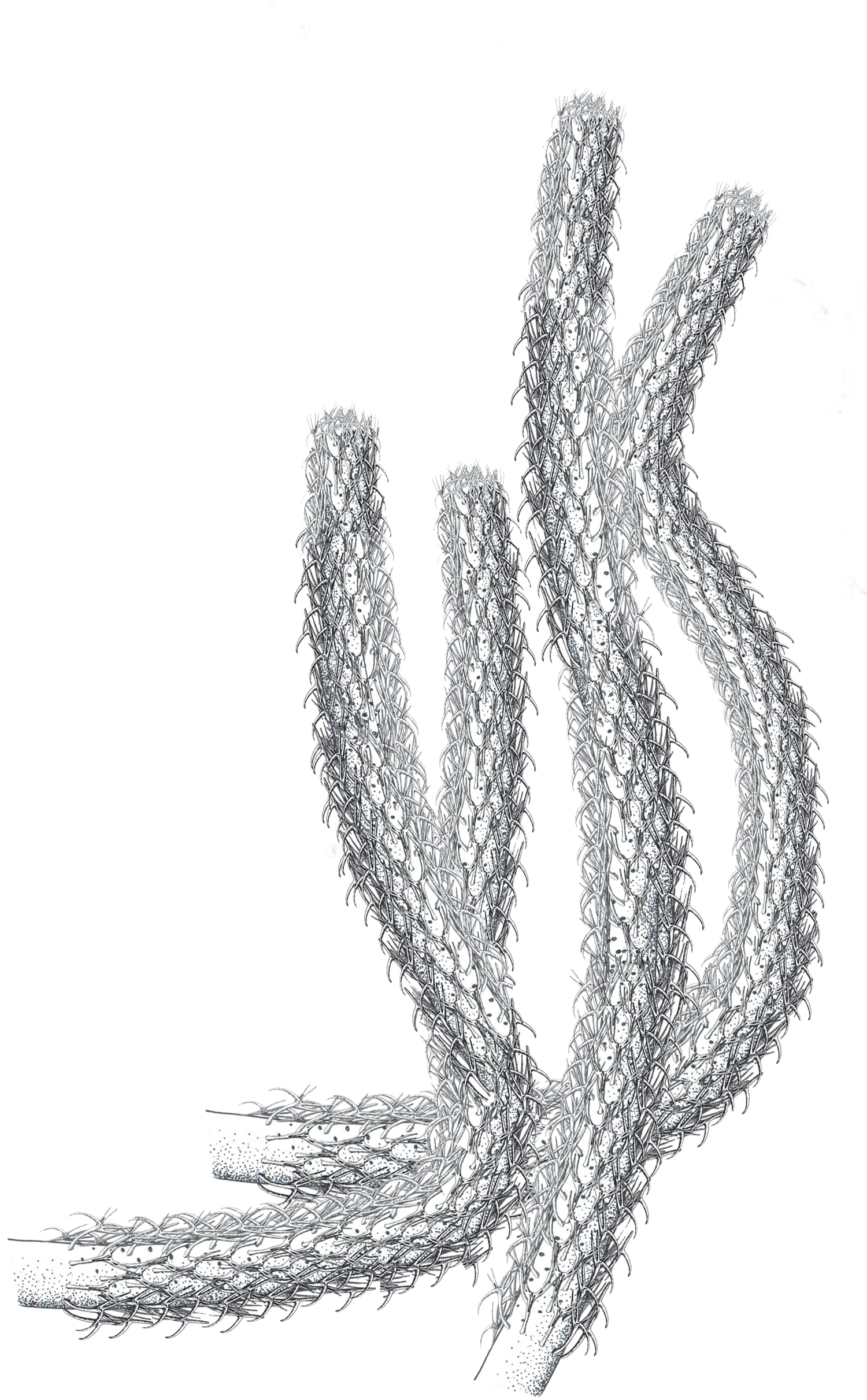 Reconstrucción artística del tallo de Leclercqia con unos delgados tallos que portan, insertados helicoidalmente, micrófilos de diferente morfología según la especie.